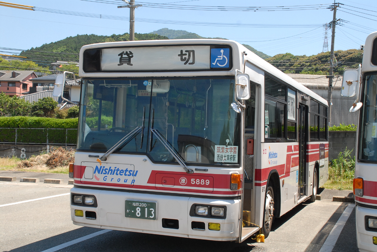 原支社にて、2019-6-25 許可を得て撮影